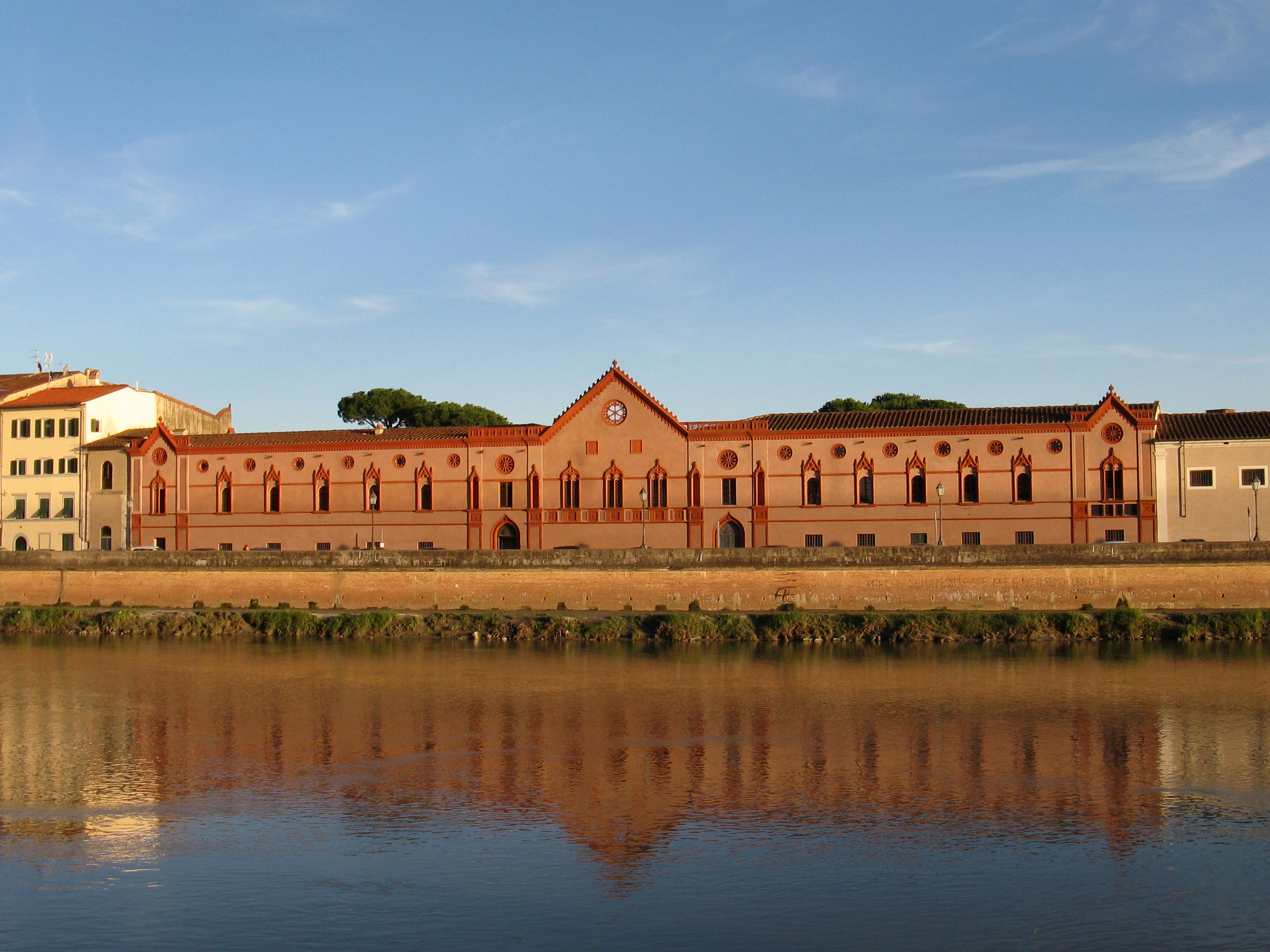 Convento delle Benedettine, Pisa, 2017.